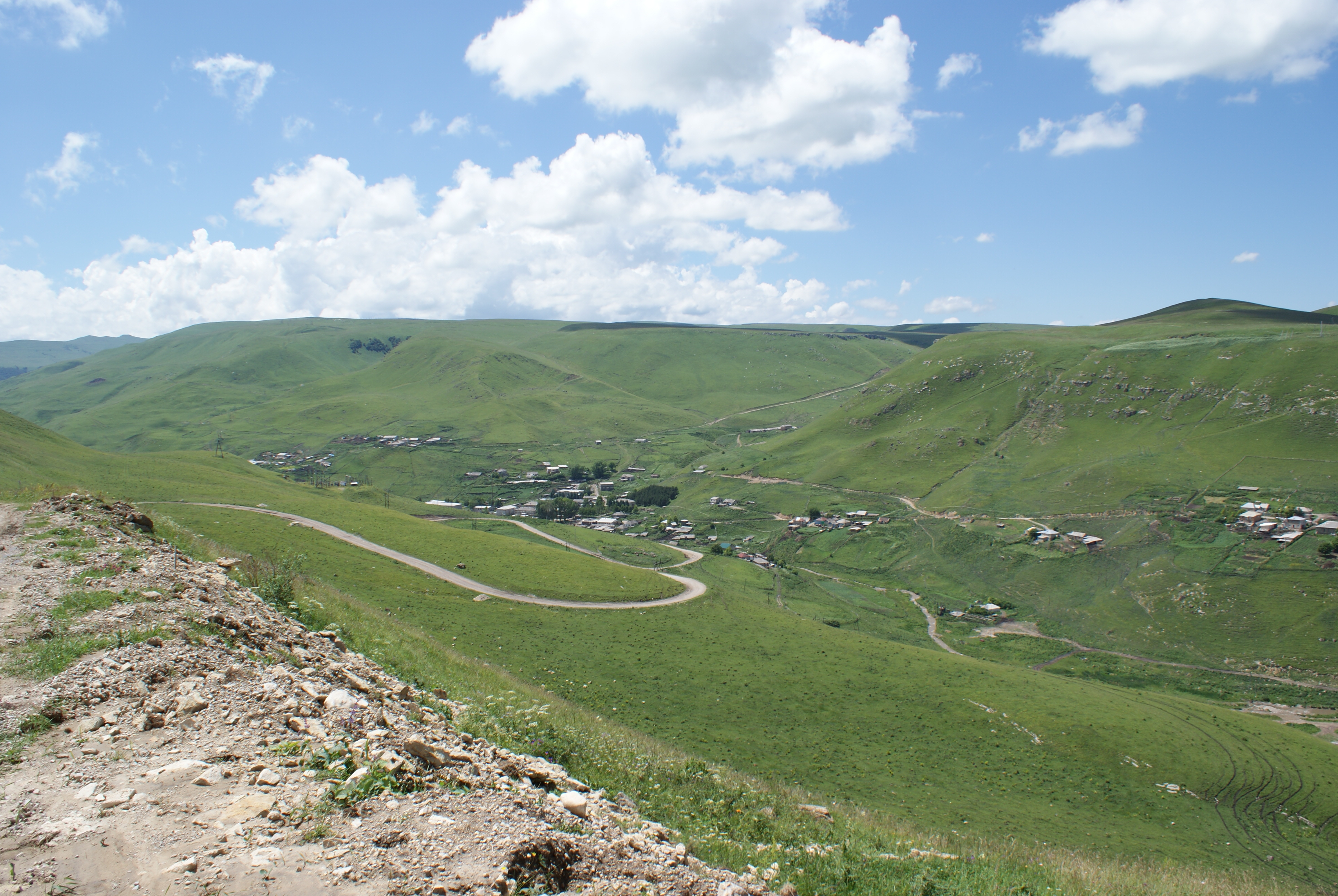 Панорама села Кичи-Балык, Малокарачаевского района, КЧР